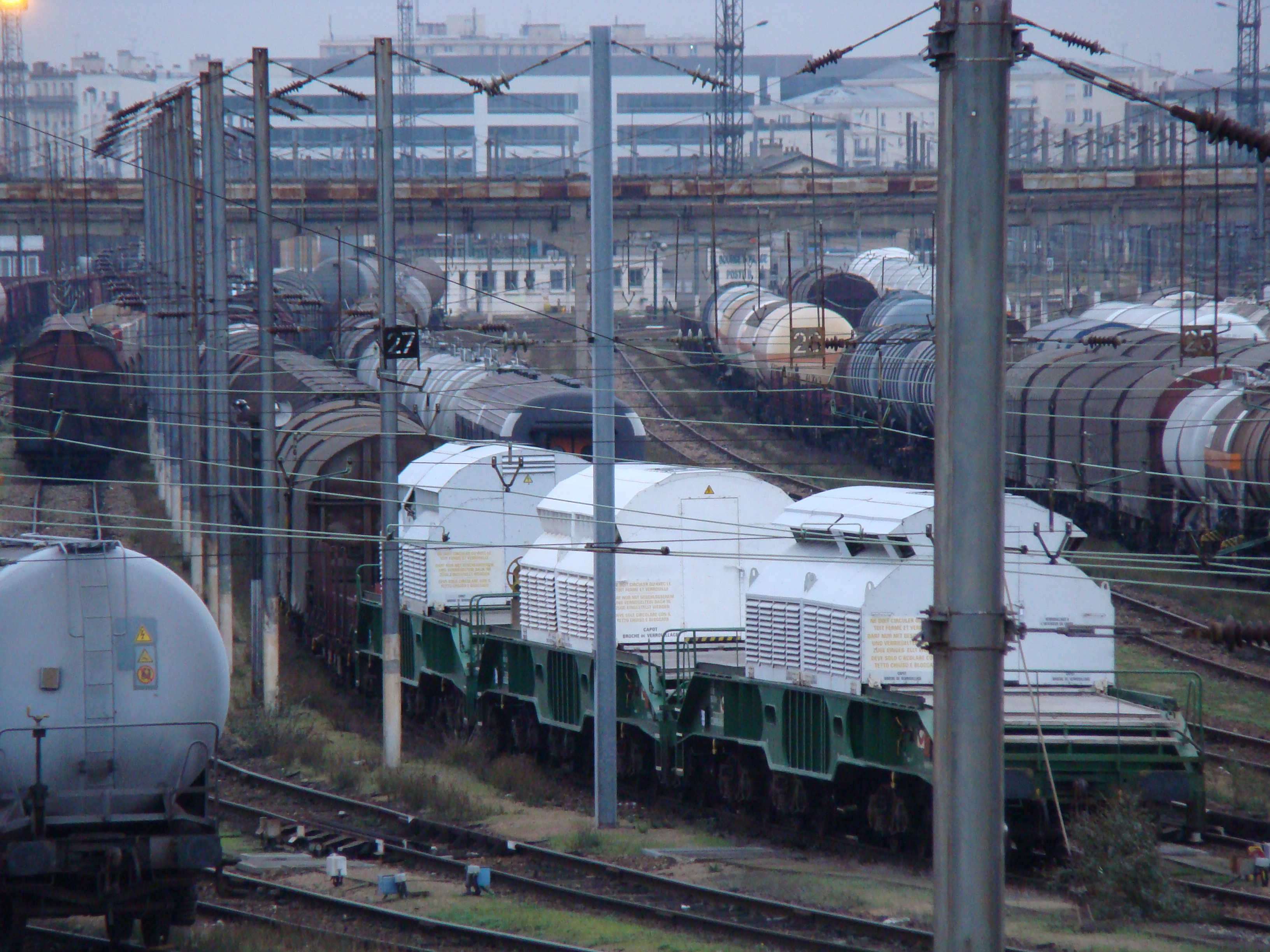 Ces wagons ont été déclarés "vides" par les autorités.